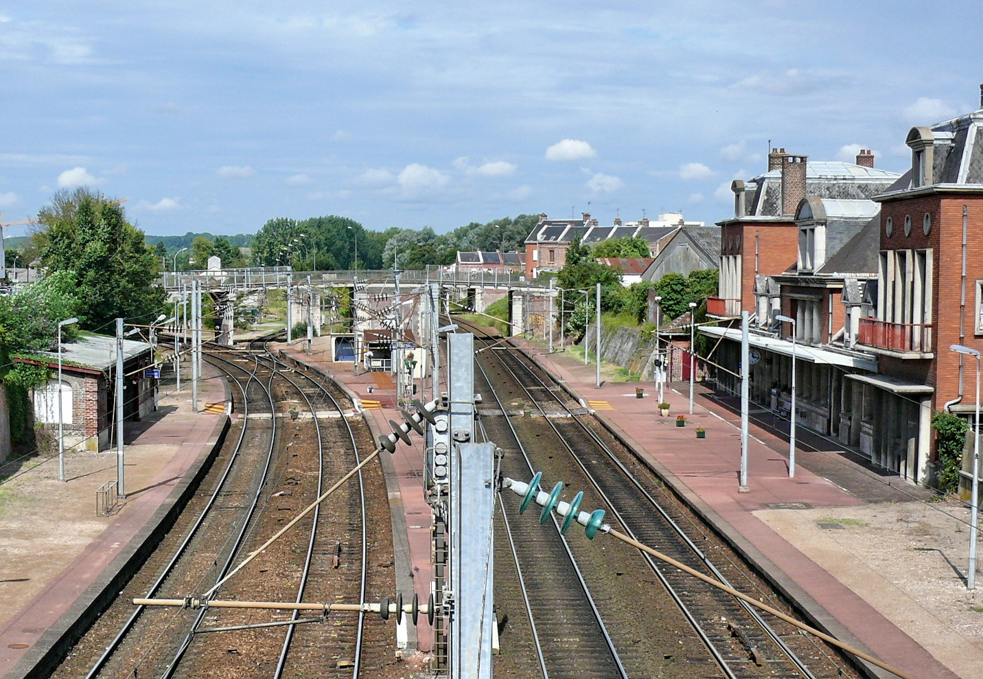 Amiens : Gare Saint-Roch vue vers l'ouest, depuis le pont de l'avenue du Général Foy : A gauche, les deux voies de la ligne Rouen - Amiens, à droite, celles de Paris - Amiens - Boulogne. Au fond, on distingue sur les voies de Rouen la bifurcation de la ligne à voie unique vers Doulens.